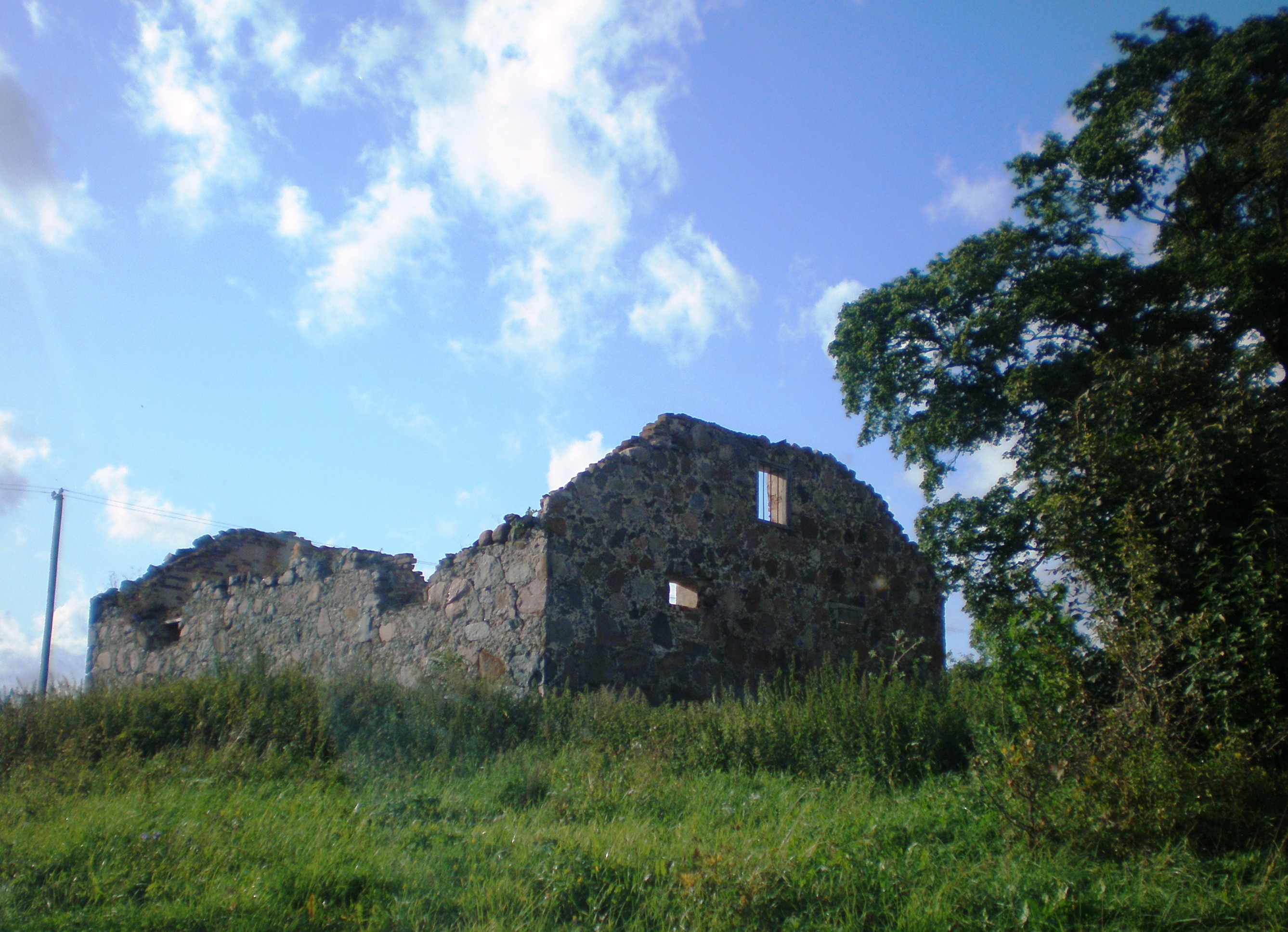 Vosbučiai, Kėdainių raj., Lietuva